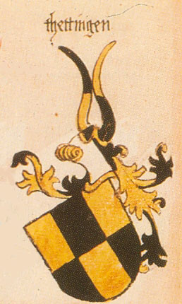 Ingeram-Codex der ehemaligen Bibliothek Cotta thettingen freigestellt aus